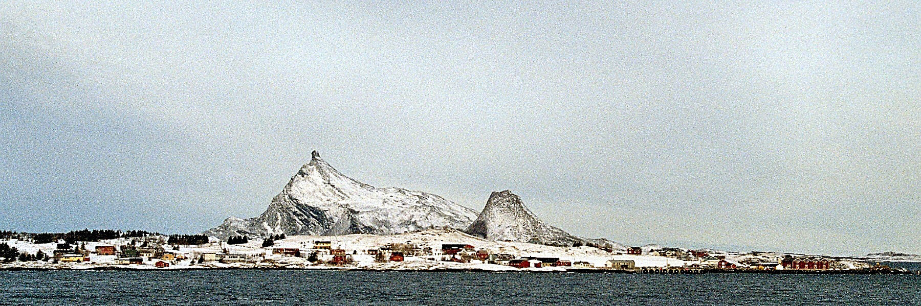 maart 2005